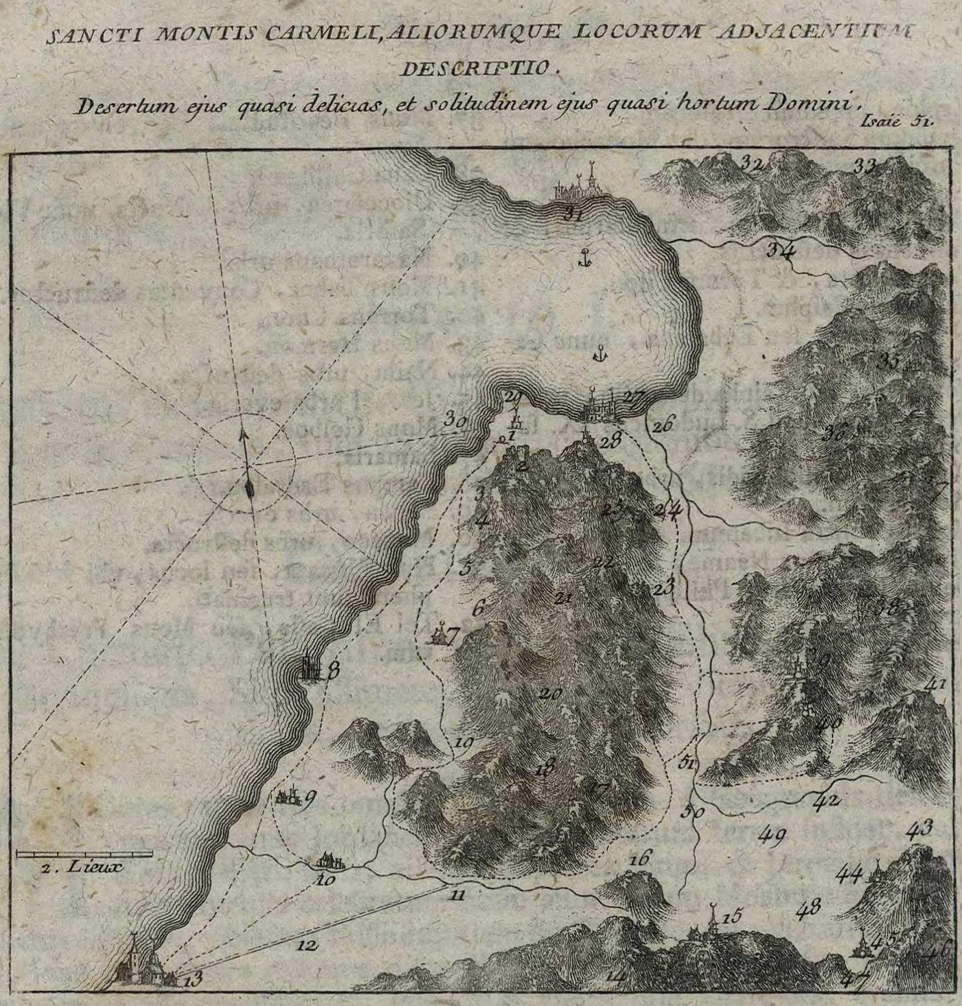 Gravure de la carte du Mont Carmel, fin XVIII° siècle. , Aliorumque locorum adjacentium descriptio